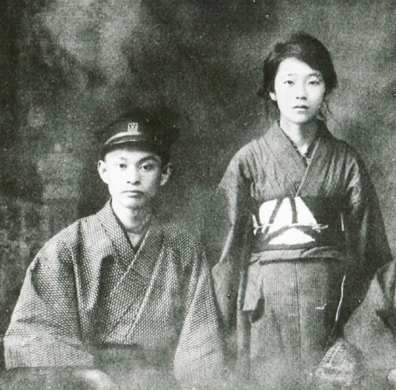 川端康成と伊藤初代。婚約翌日に撮影された写真